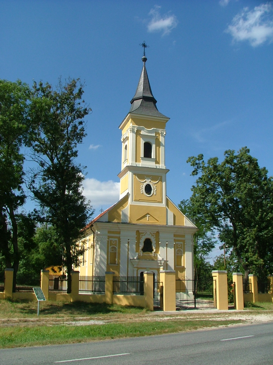 Téti római katolikus templom